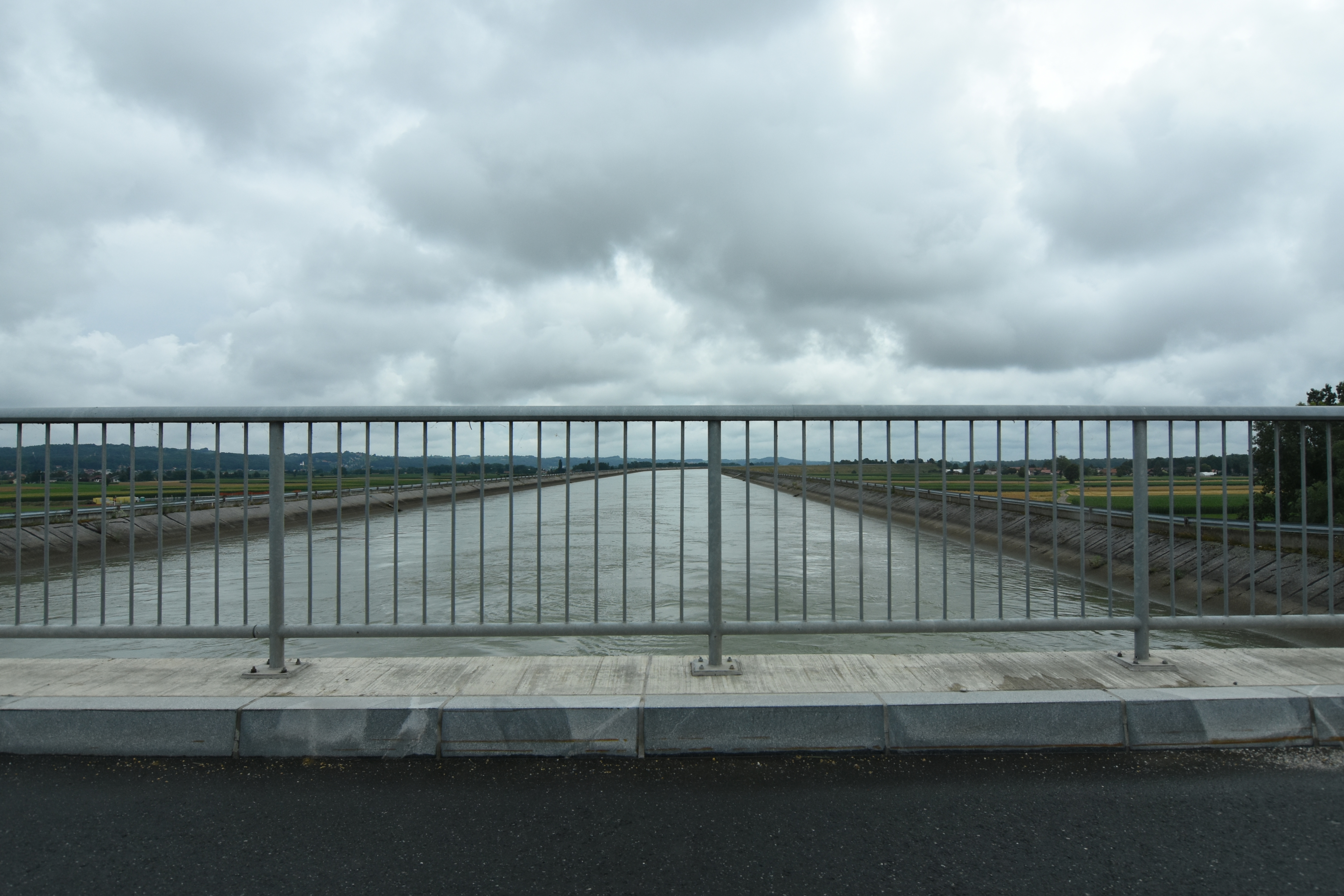 Gorišnica municipality Drau Kanal Slovenia